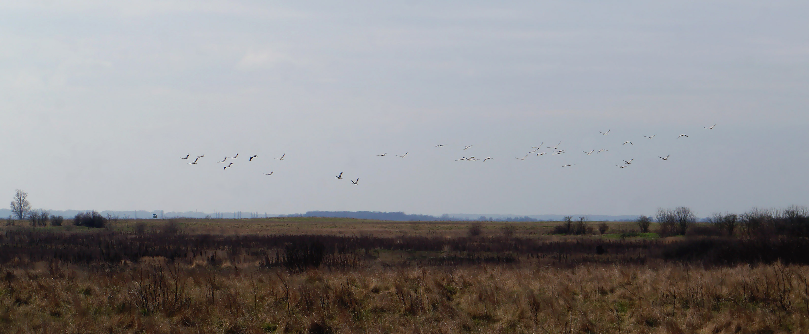 Srpski (latinica): Ždralovi izleću iz nekadašnjeg meandra Tise ili njene pritoke, u blizini starih kurgana kod Sigeta u Banatu. (Šuma na horizontu pokazuje položaj današnje Tise.)